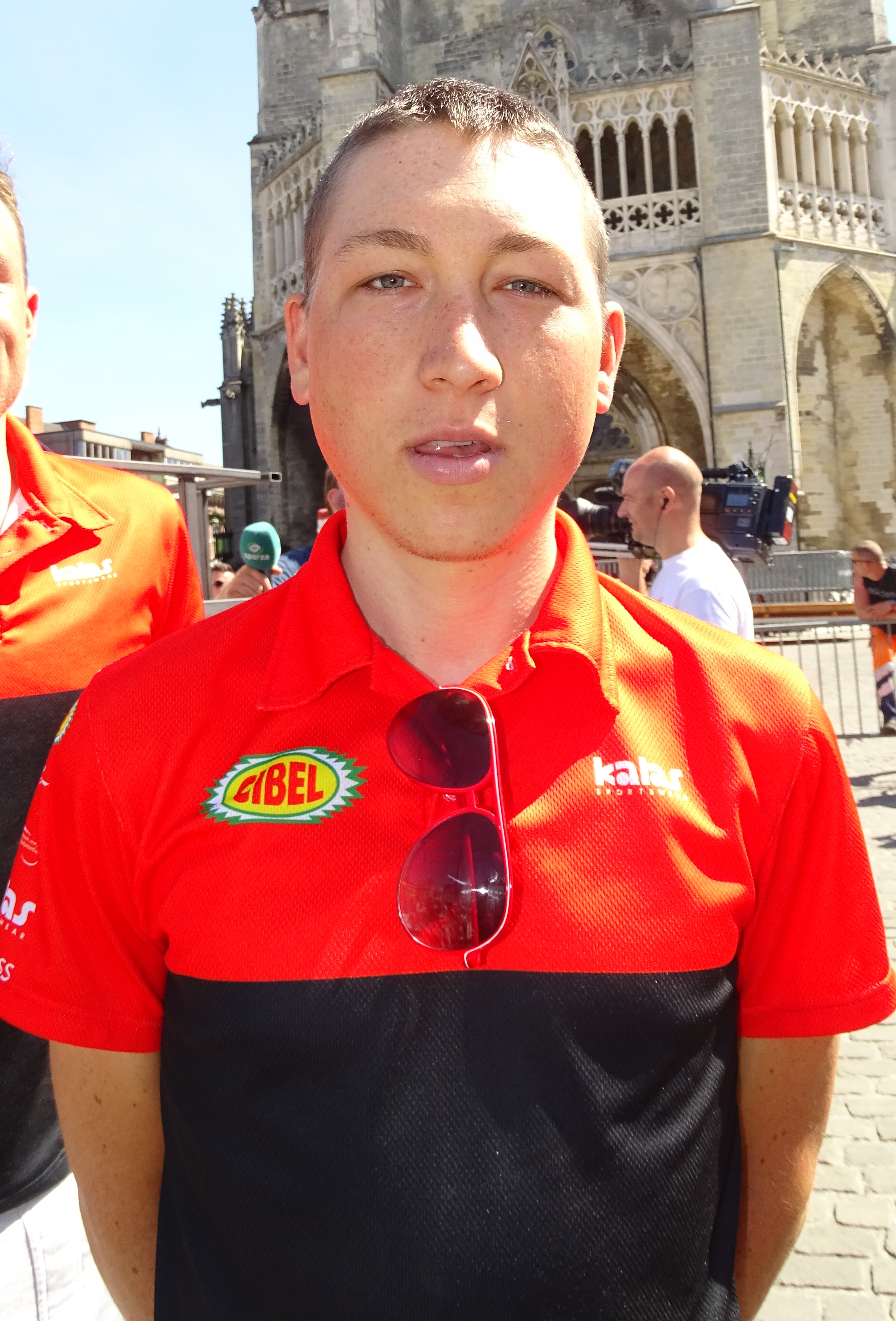 Reportage réalisé le dimanche 14 juin à l'occasion du départ et de l'arrivée du Tour du Limbourg 2015 à Tongres, Belgique.